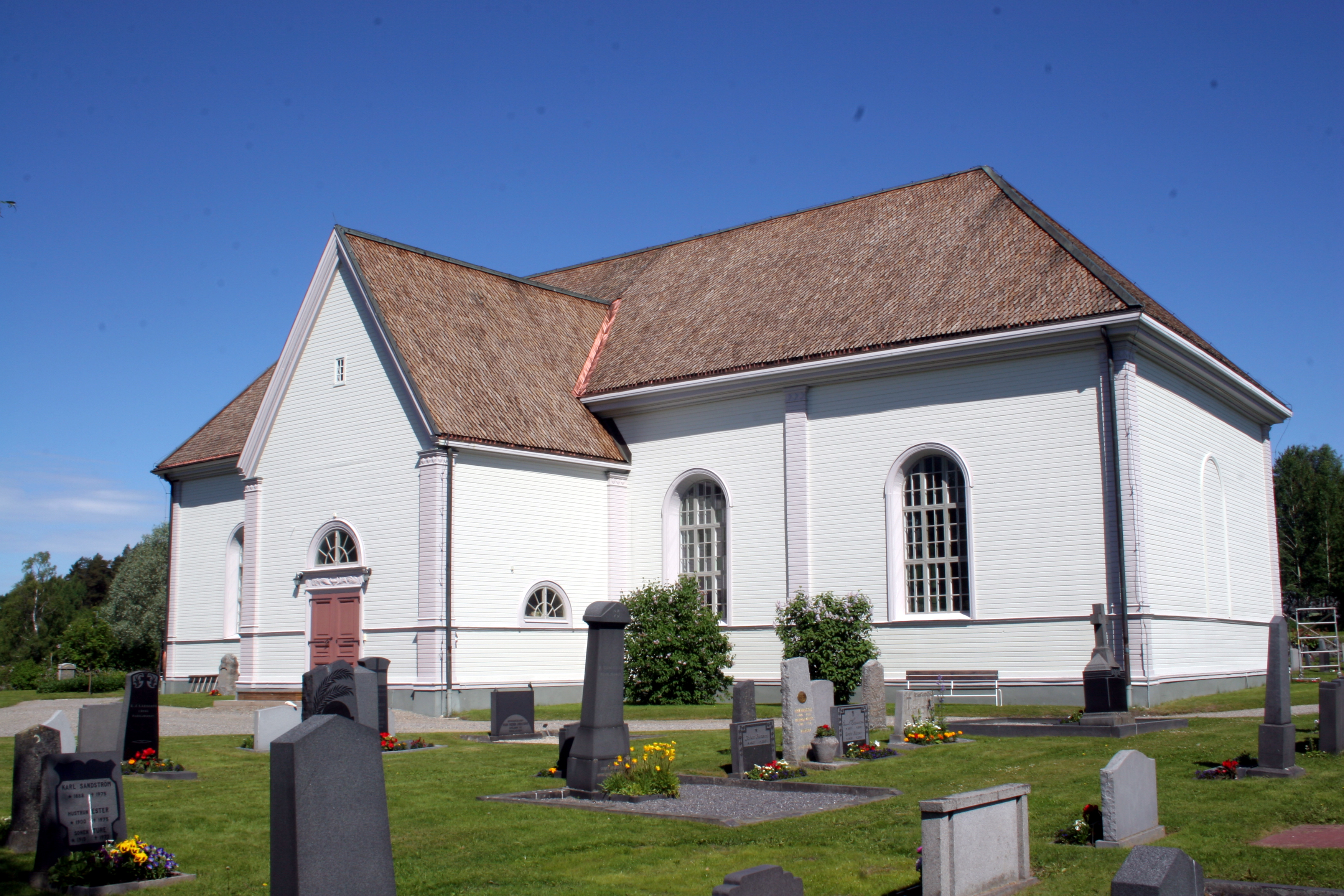 Vännäs kyrka, Vännäsby, Västerbotten, Sweden.